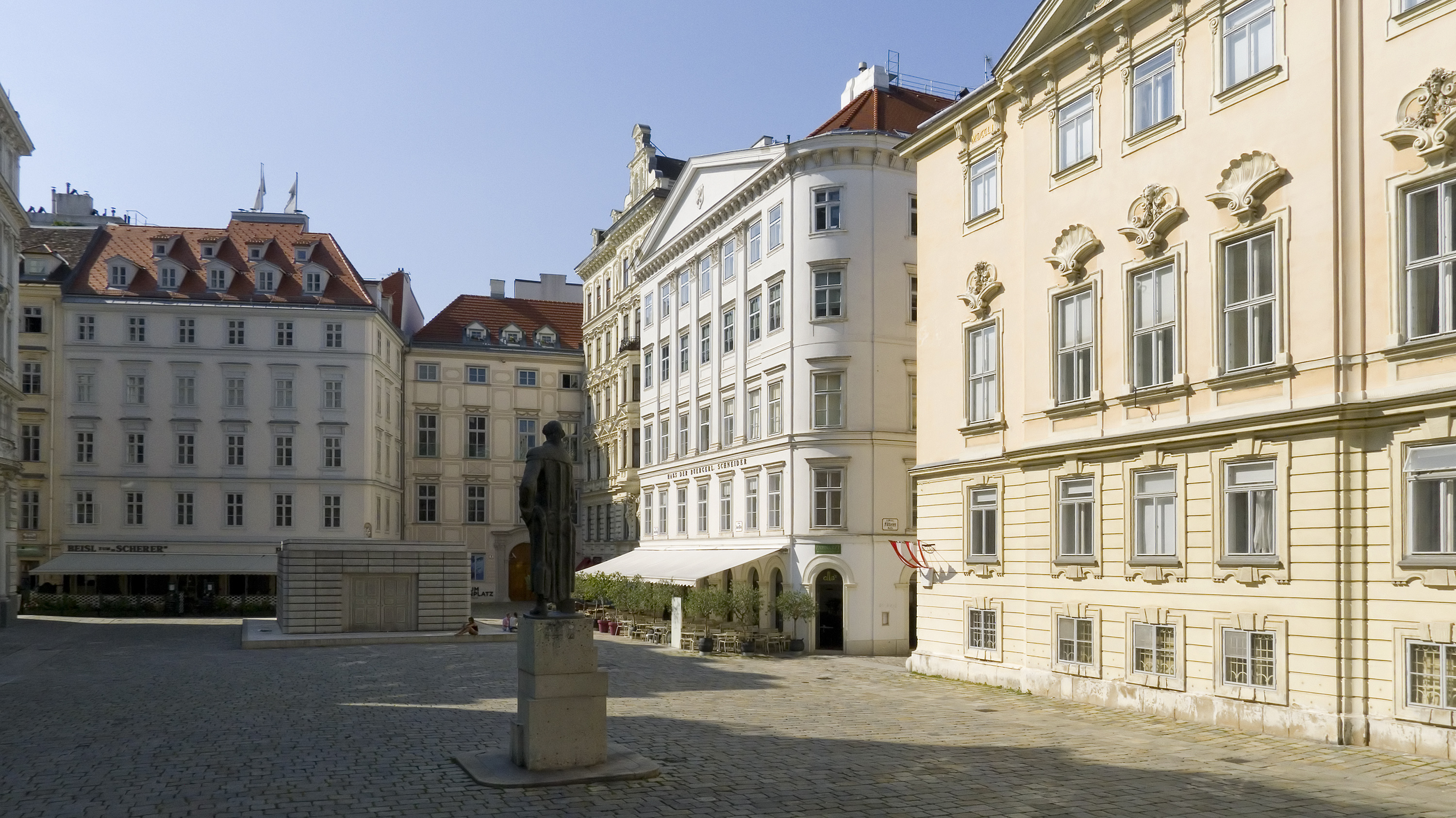 Judenplatz in Wien 1 bei Nr. 3-4 Richtung Nordwesten